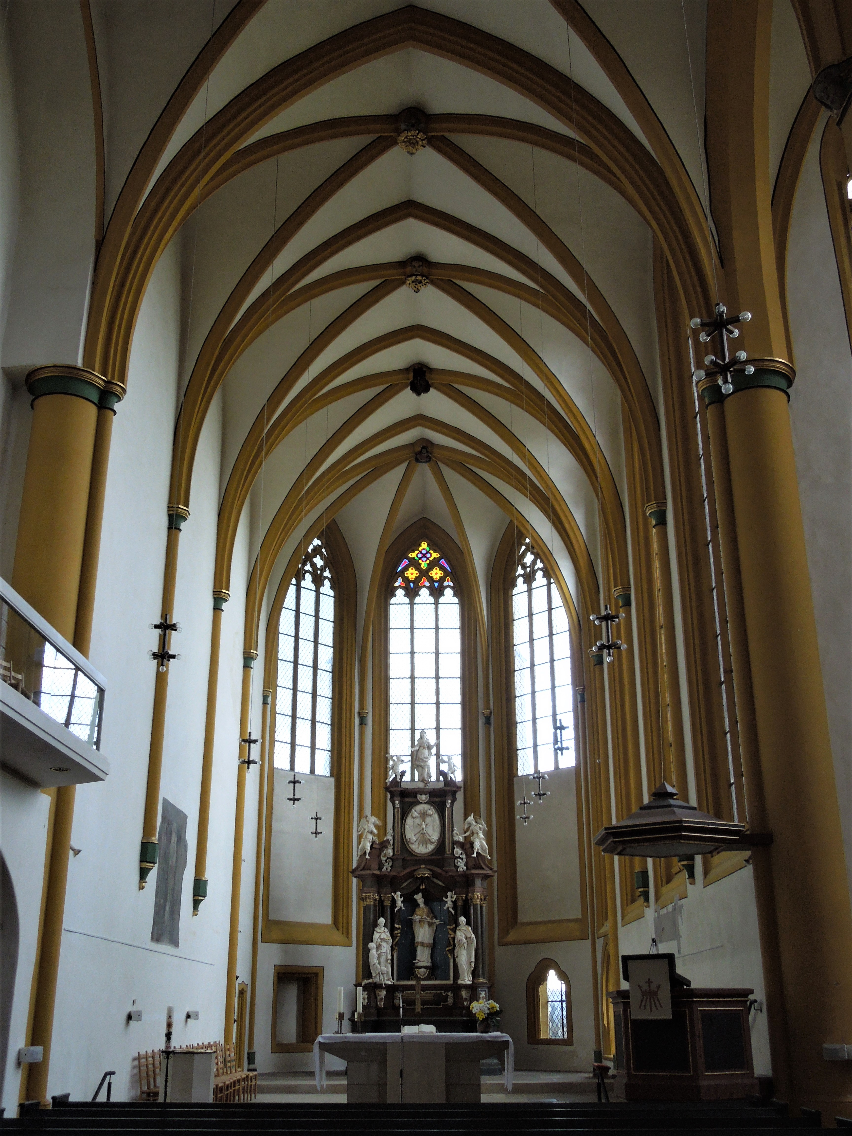 Evangelische Stadtkirche Fritzlar, Innenansicht des Chorraums